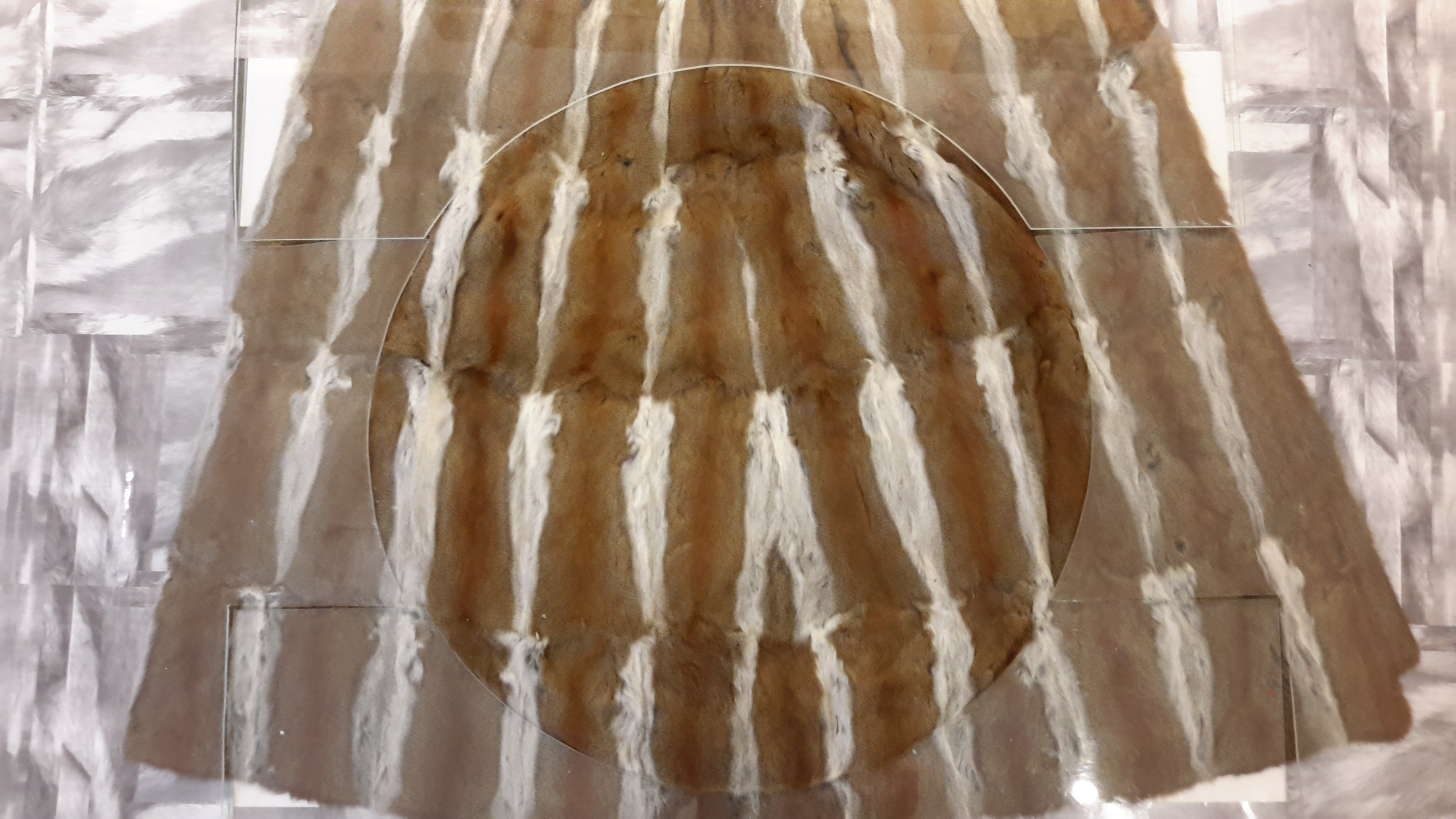 Cora Fisch, Berlin. Skulptur–Installation Quadratur des Pelzes. Galerie Z22 (White Cube), Berlin. Vernissage am 3. Mai 2018. (Kanadisches Fehfell)